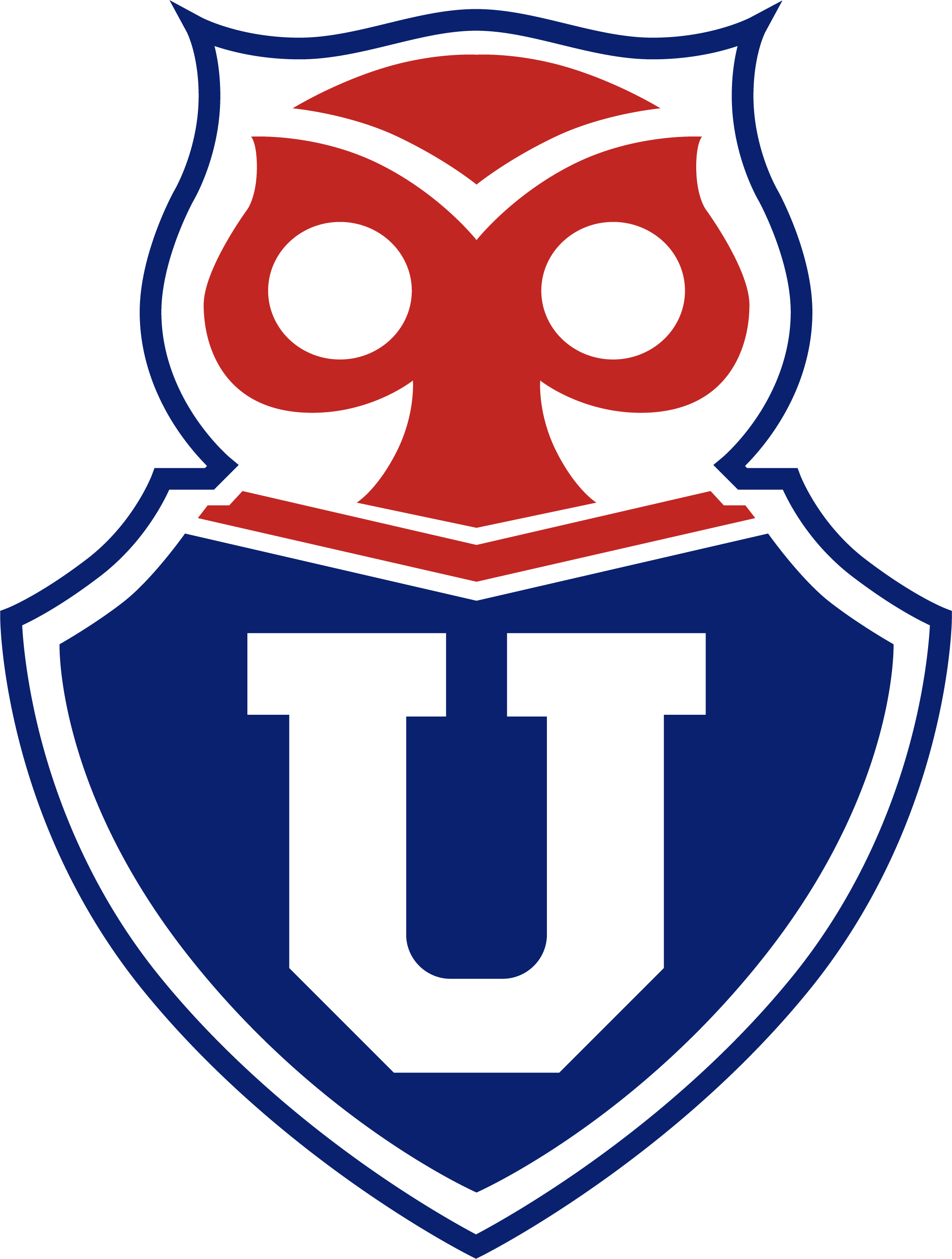 escudo del Club Universidad de Chile.